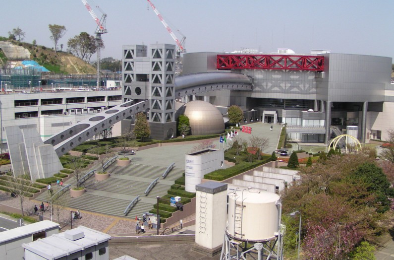 2005年4月17日に投稿者が横浜市栄区で撮影。